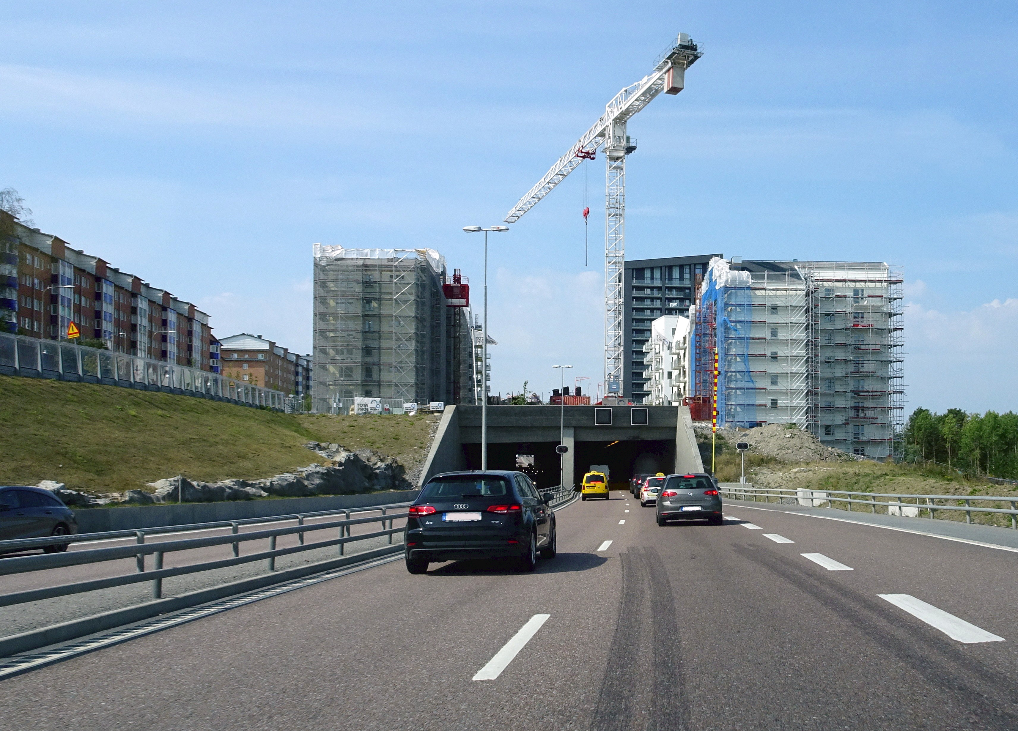 E18 med Rinkebytunneln och nya bebyggelsen för norra Rinkeby